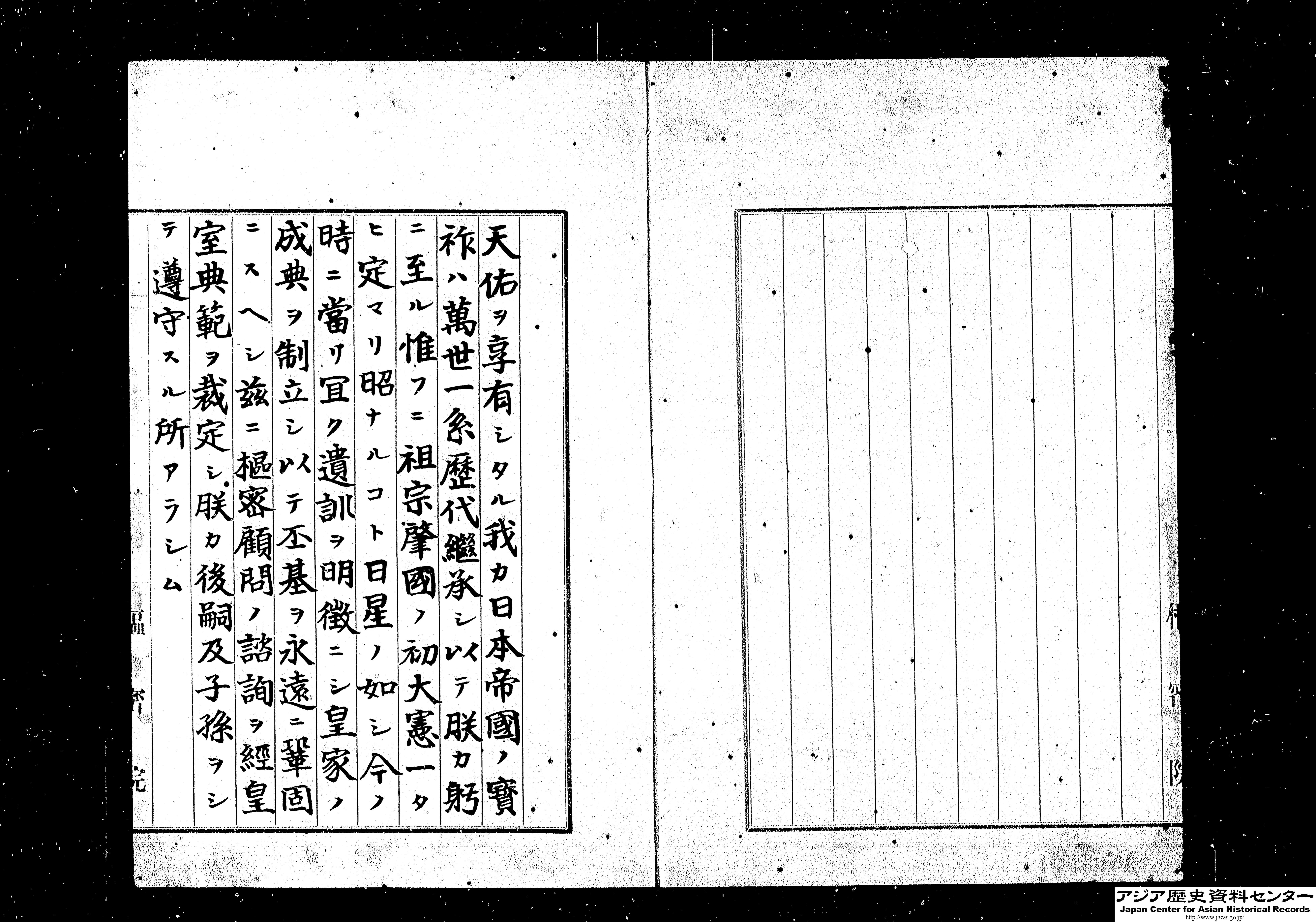 皇室典範・御署名原本・明治二十二年・皇室典範二月十一日（旧皇室典範）